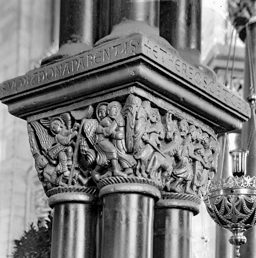 Onze Lieve Vrouwekerk: Interieur, kapiteel in het koor, eerste van het midden